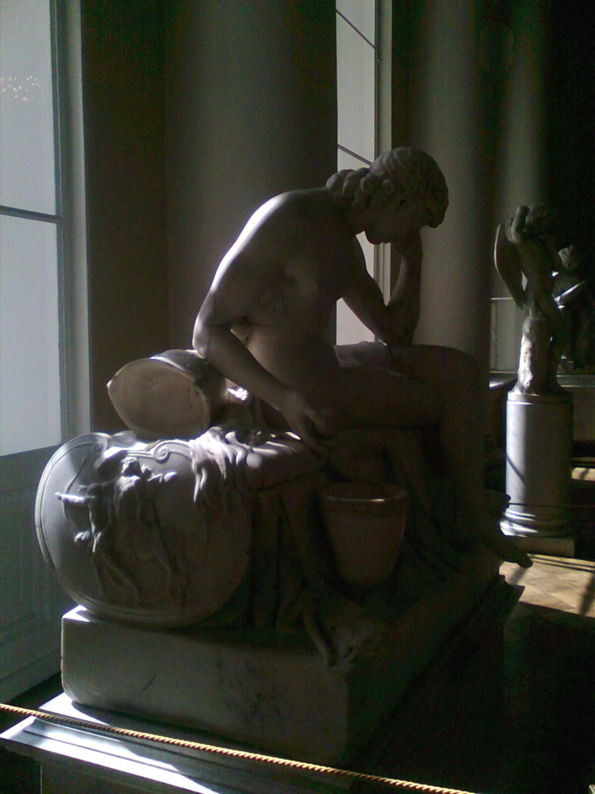 М. Козловский. «Бдение Александра Македонского», 1780-е, ГРМ